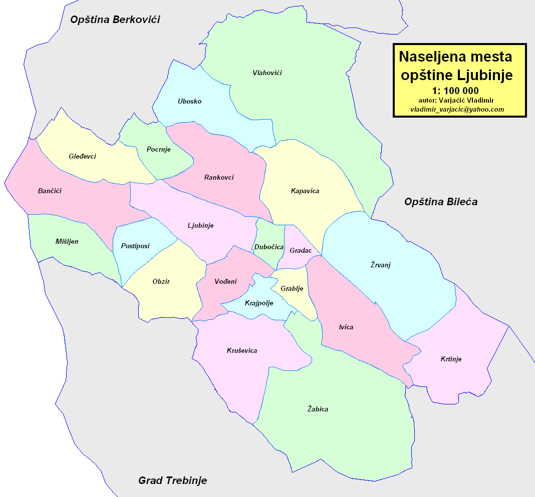 Opština Ljubinje